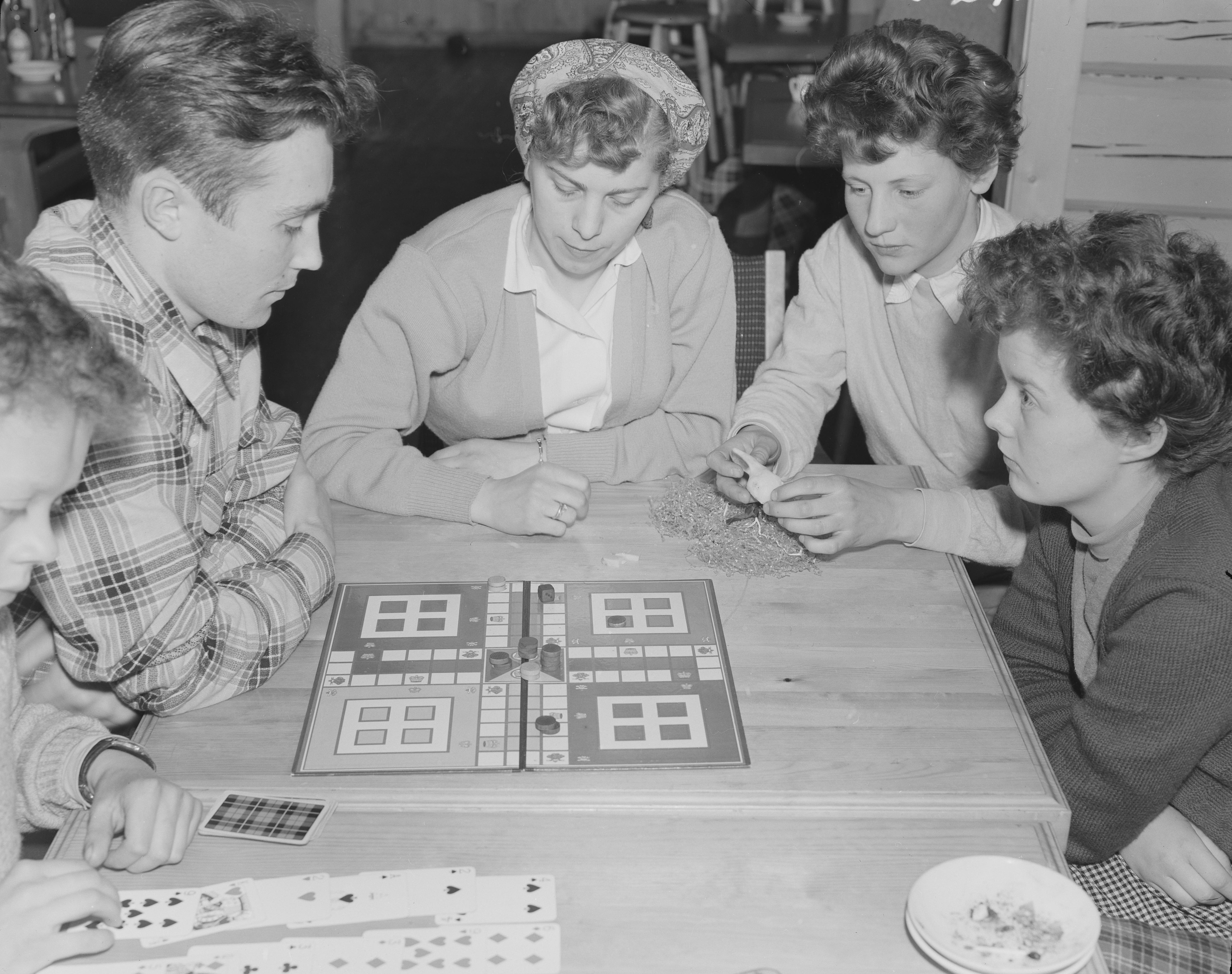 Bildet er hentet fra Nasjonalbibliotekets bildesamling. Anmerkninger til bildet var: Fotograf:Ukjent